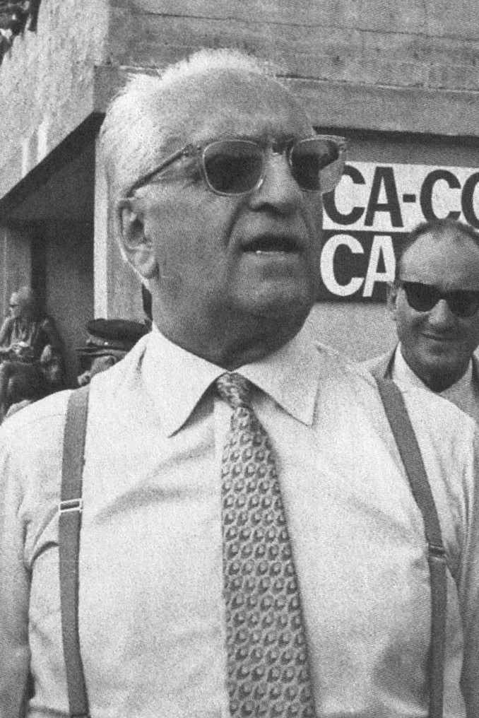 Monza, Autodromo Nazionale, settembre 1967. Enzo Ferrari, fondatore della Scuderia Ferrari, a colloquio con i giornalisti nei box del circuito, nel weekend del XXXVIII Gran Premio d'Italia.